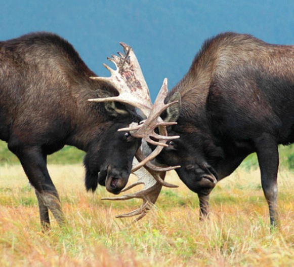 گوزن شمالی موس